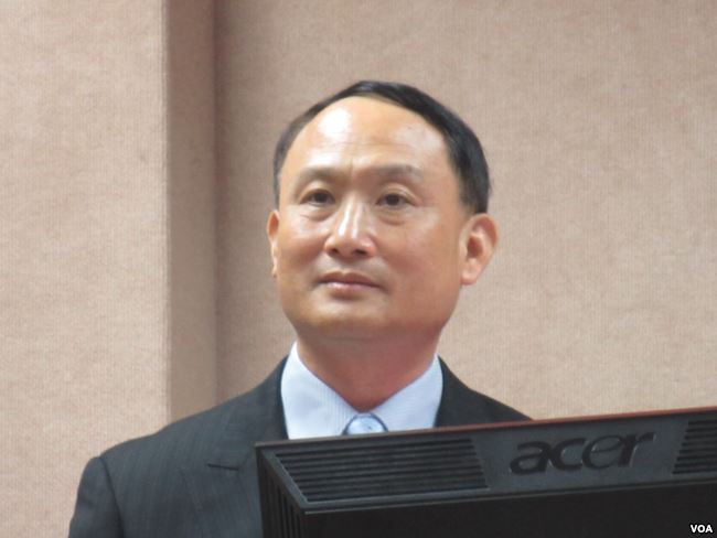 中文（台灣）: 台灣國防部副部長鄭德美上將